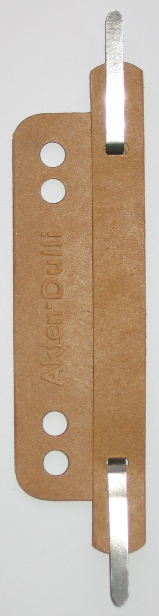 Akten-Dulli (Heftstreifen), ca. 1950.